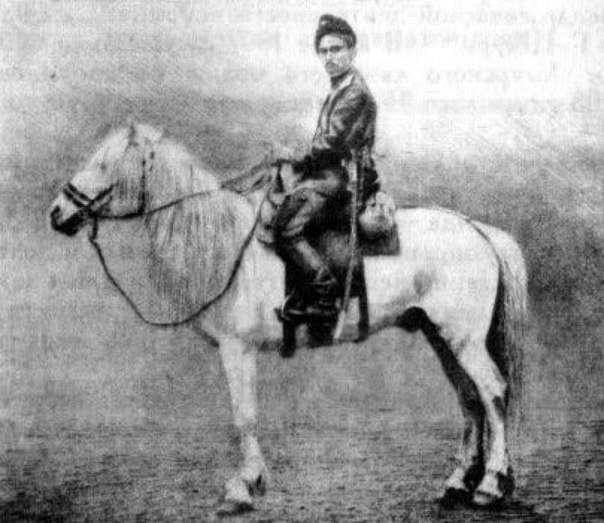 Путешественник Дмитрий Николаевич Пешков